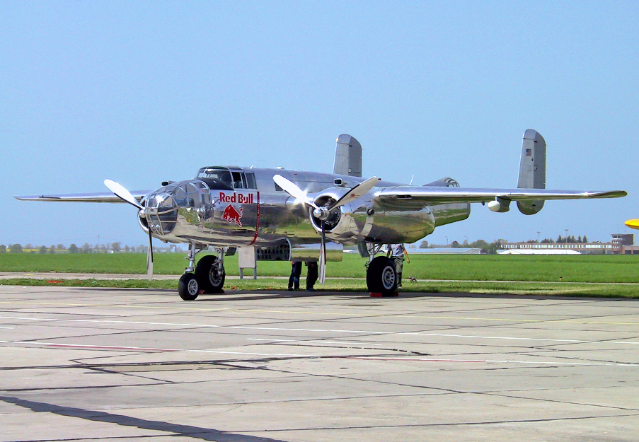 Eine North American B-25 „Mitchell“ auf der ILA 2002.